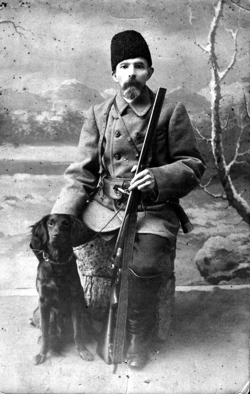 Потомственный дворянин Левковский Иосиф Антонович